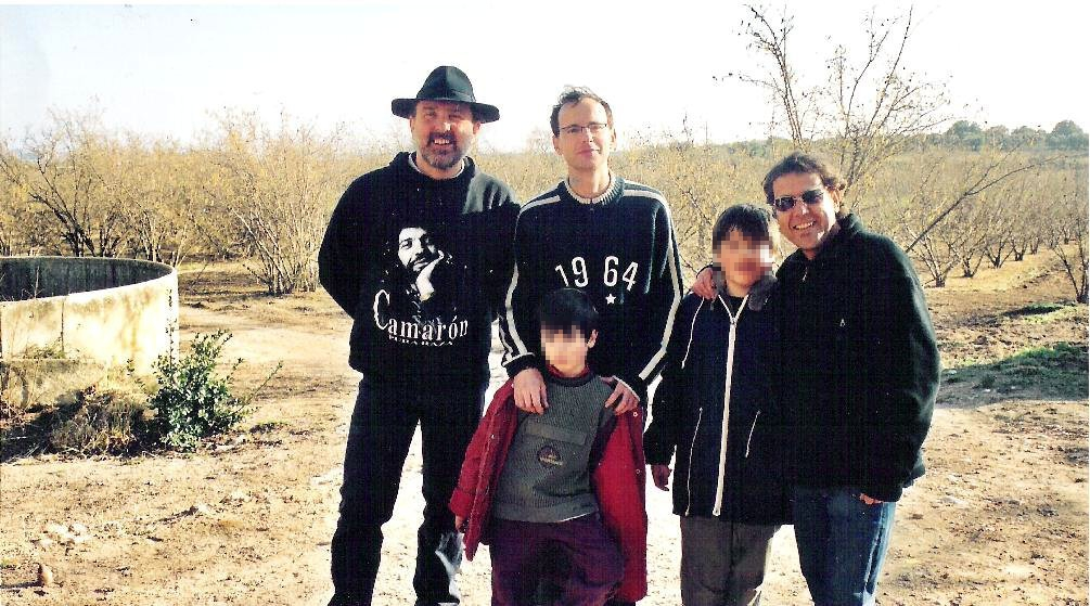 Descripció: Els Pets, grup musical de Constantí, la fotografia es presa a una calçotada l'any 2003. Llicència